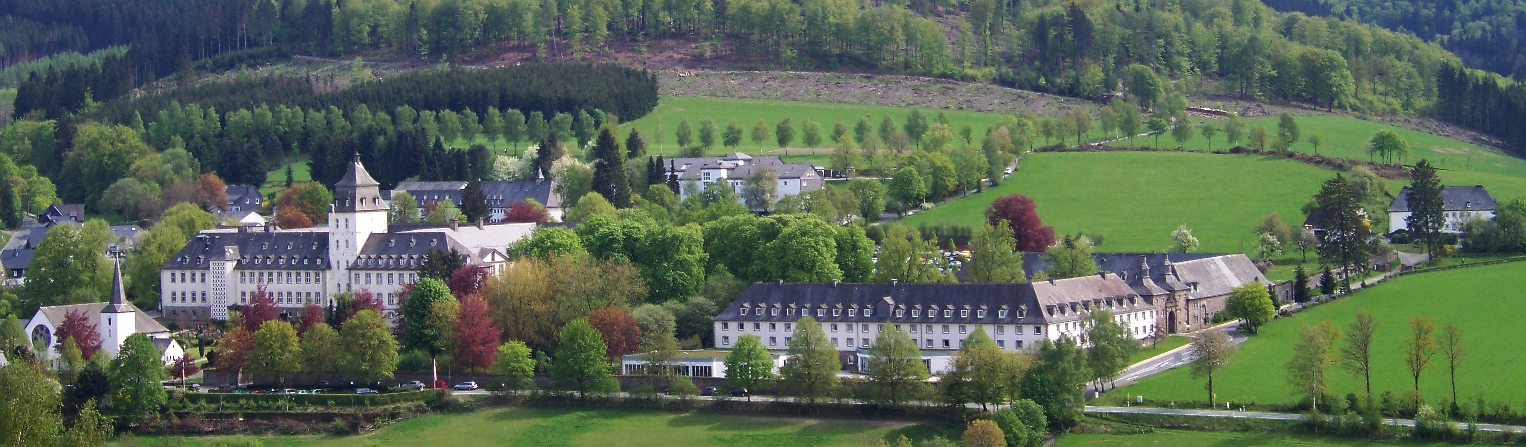 Kloster Grafschaft in Schmallenberg-Grafschaft